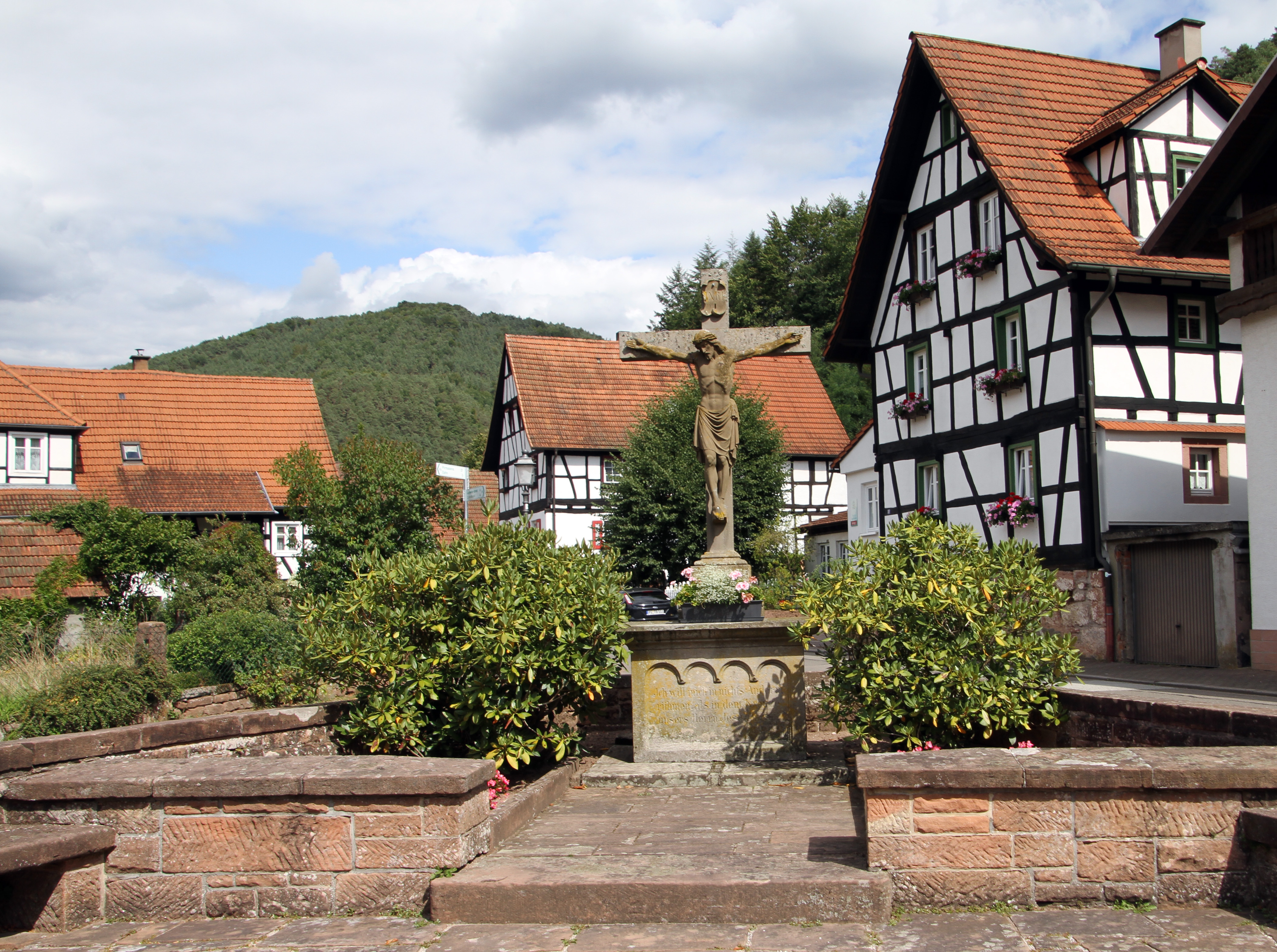 Erfweiler, Winterbergstraße 78; Kruzifix, bezeichnet 1901.